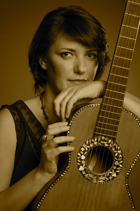 Foto di Francesco Degli Innocenti